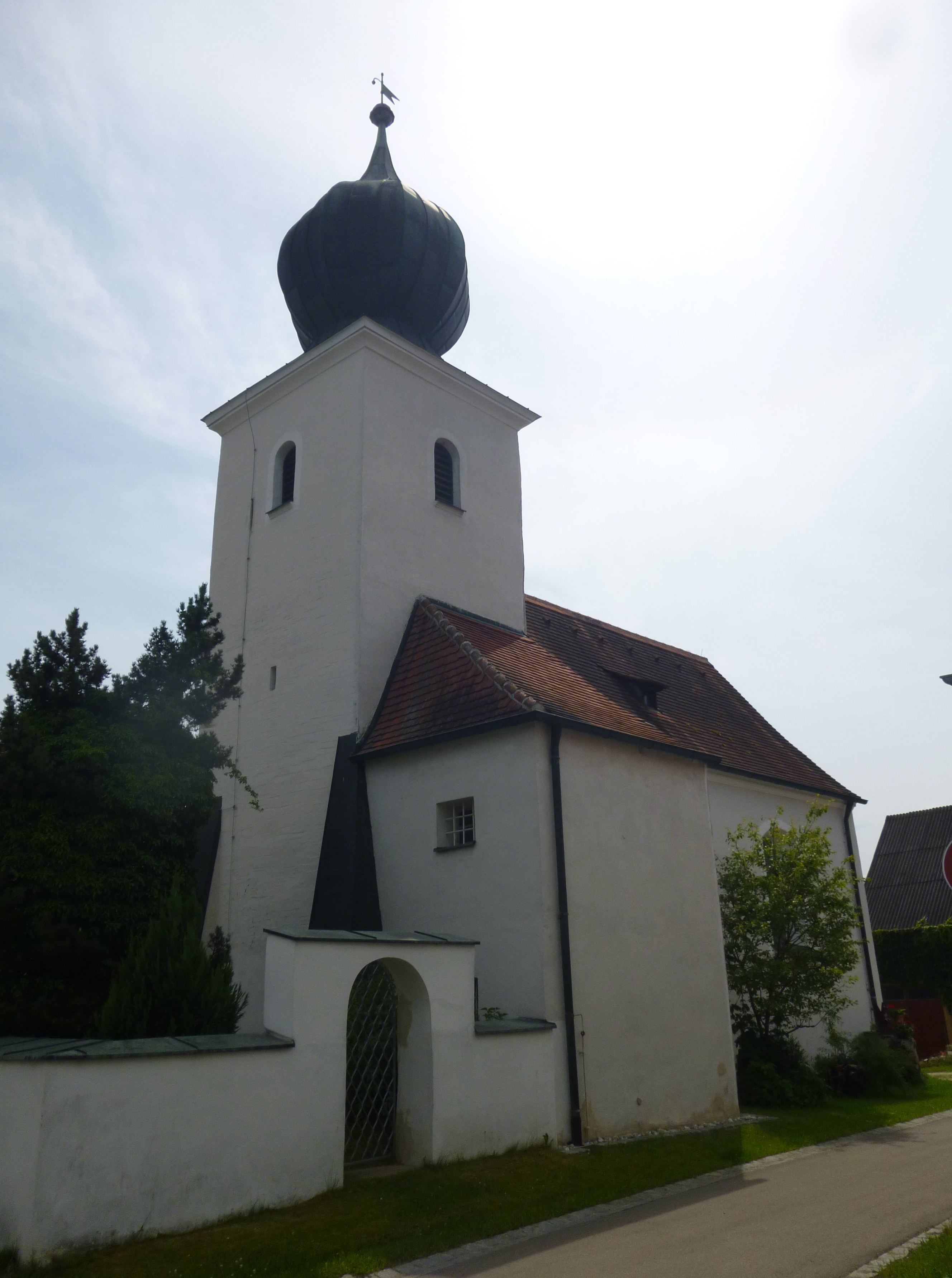 Ehemalige Jagdkapelle, Hl. Johannes der Täufer Kirche Hirschwald/Ensdorf